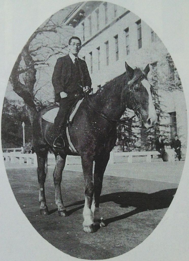 静岡県会議長時代の鈴木信雄（静岡県庁前にて）